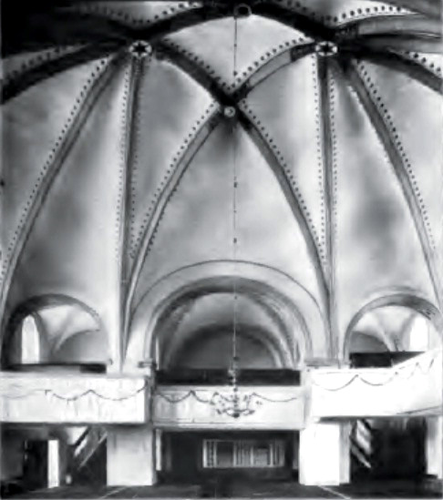 Innenansicht der Kirche in Borgeln